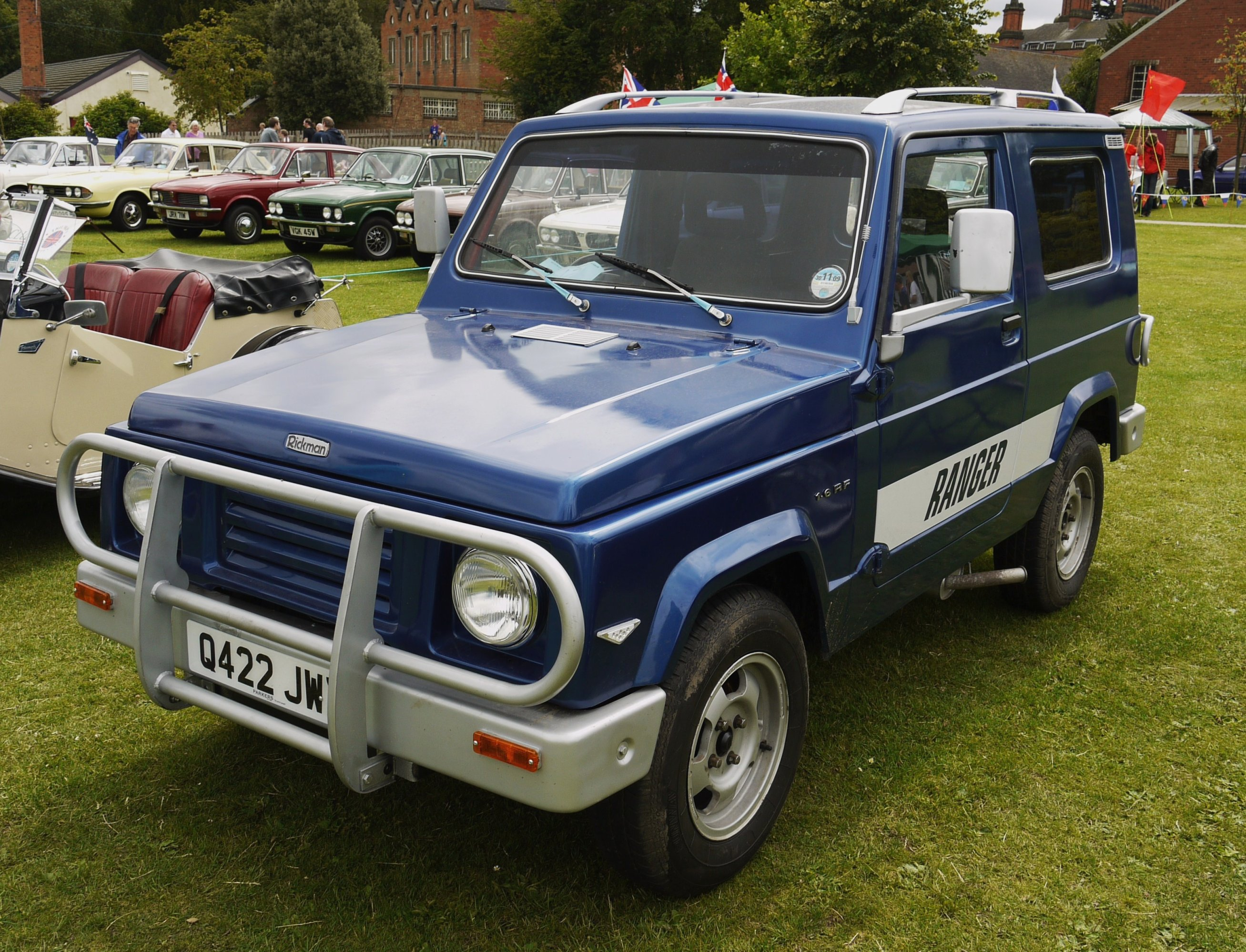 Panasonic G1 14-45 Lens